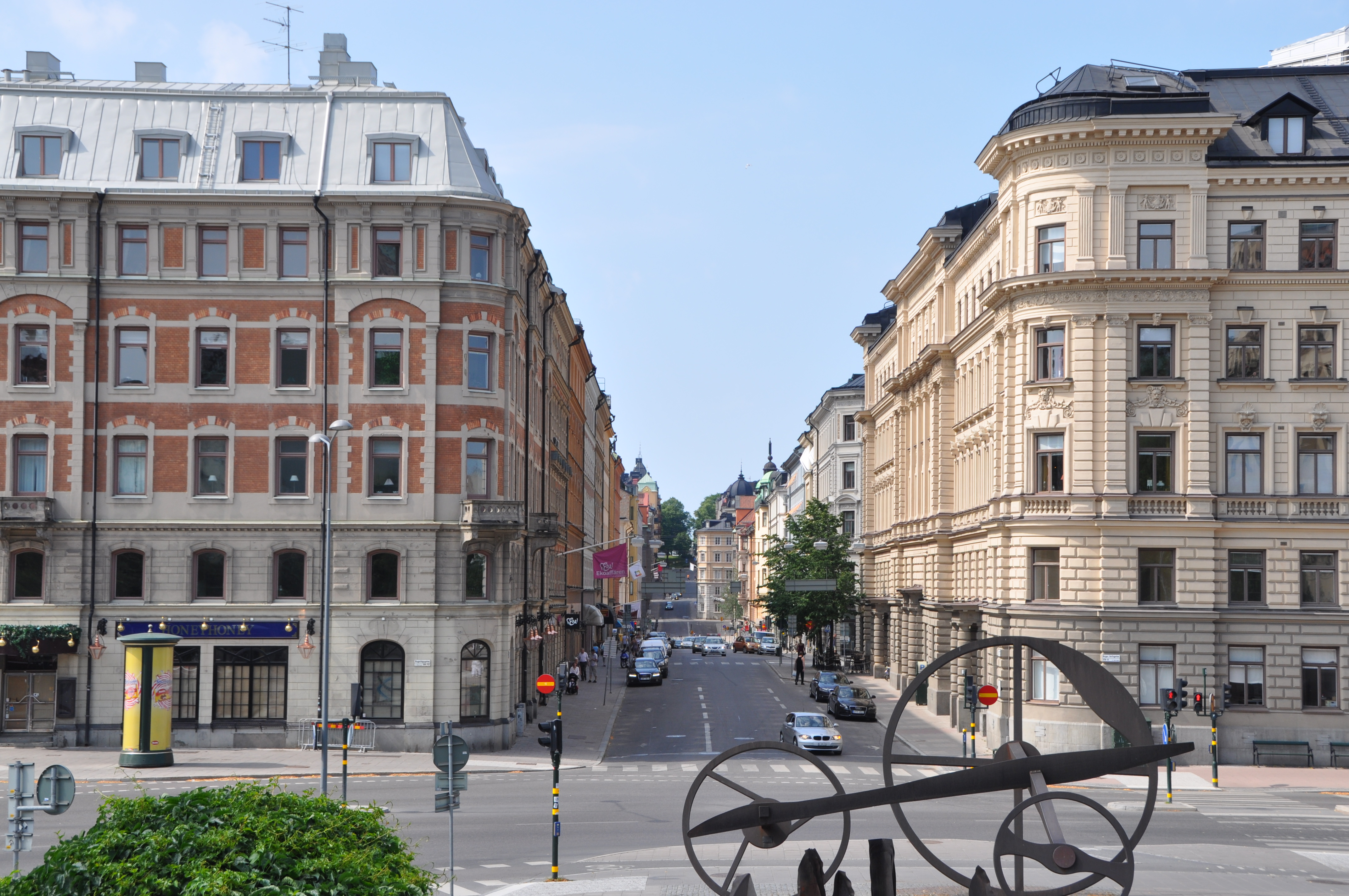 Tegnérgatan, Stockholm. Till vänster Kvarteret Hägerberget, till höger Kvarteret Spårvagnen.